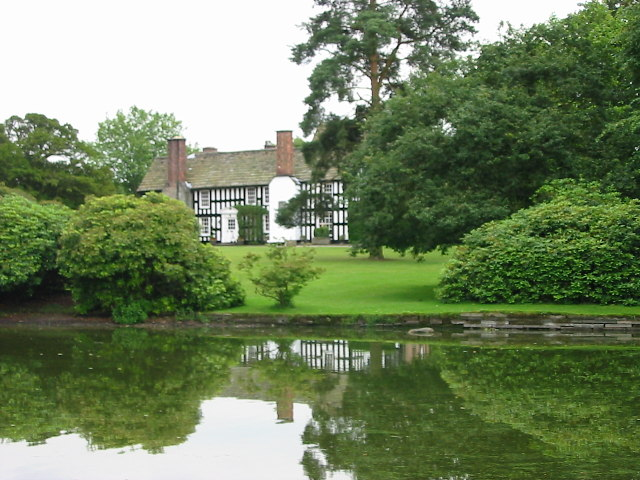 Gawsworth Hall